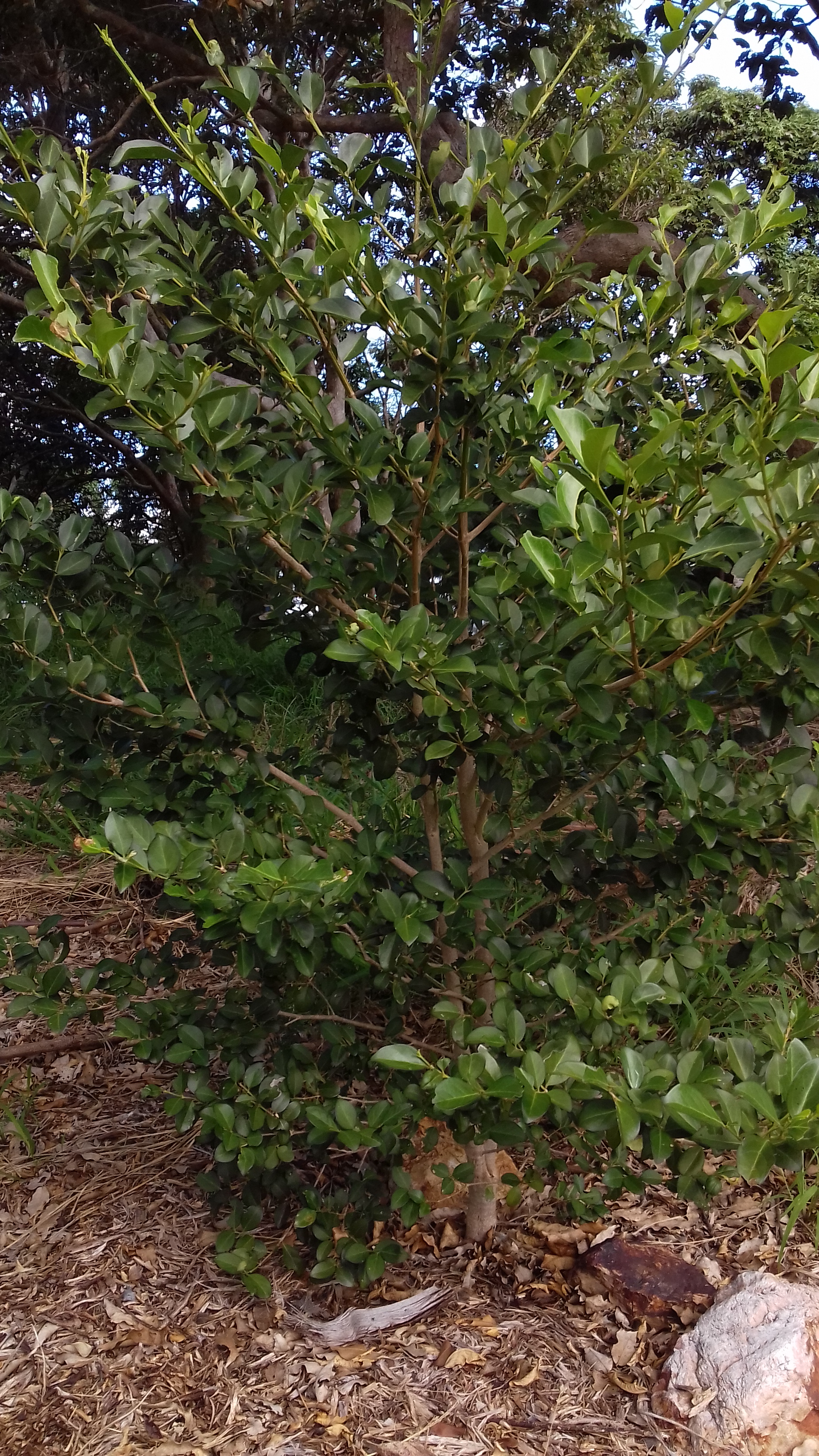 Psydrax odorata au Ouen Toro, Nouméa, Nouvelle-Calédonie